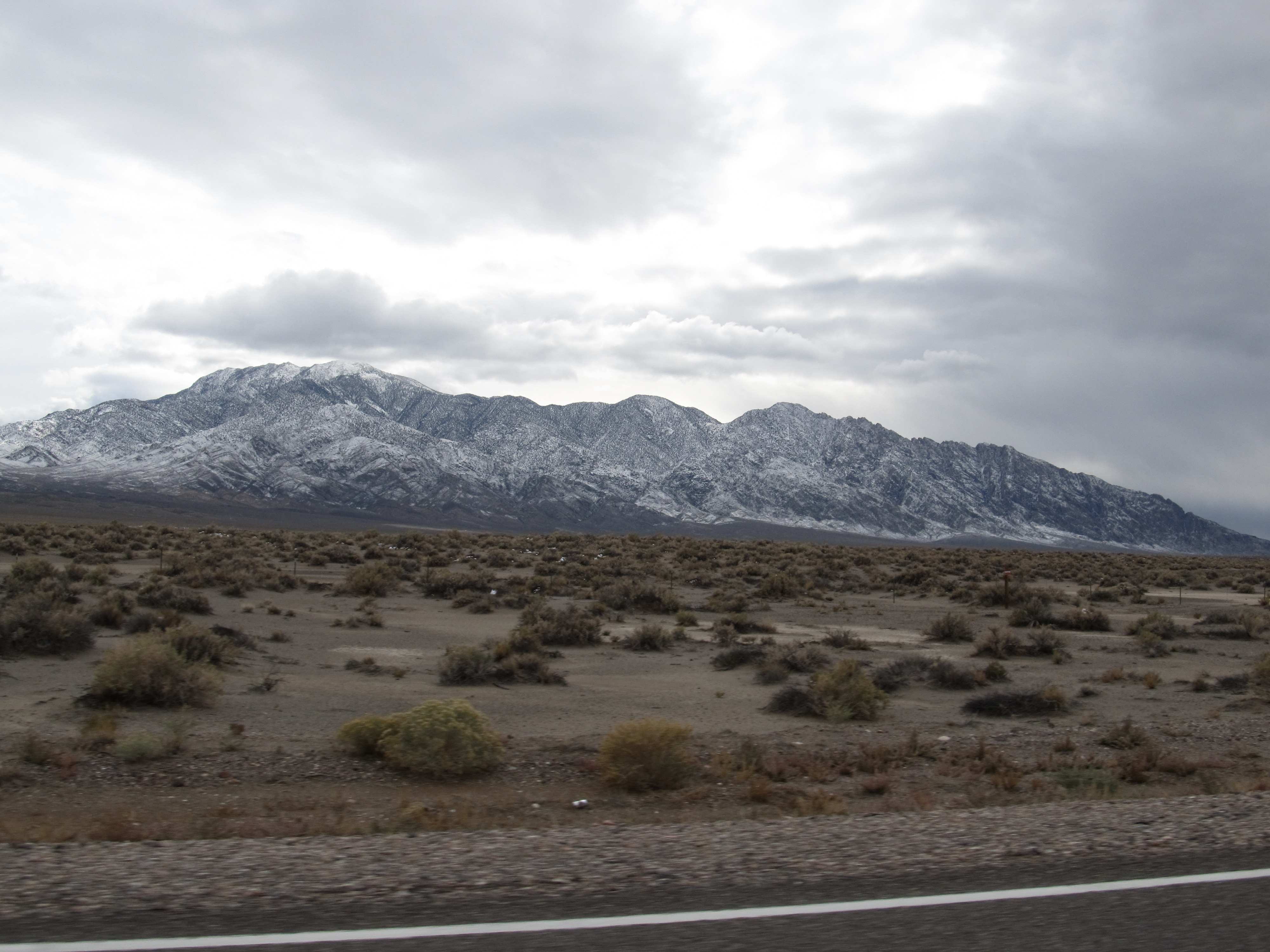 U.S. 95 Near Tonopah, Nevada